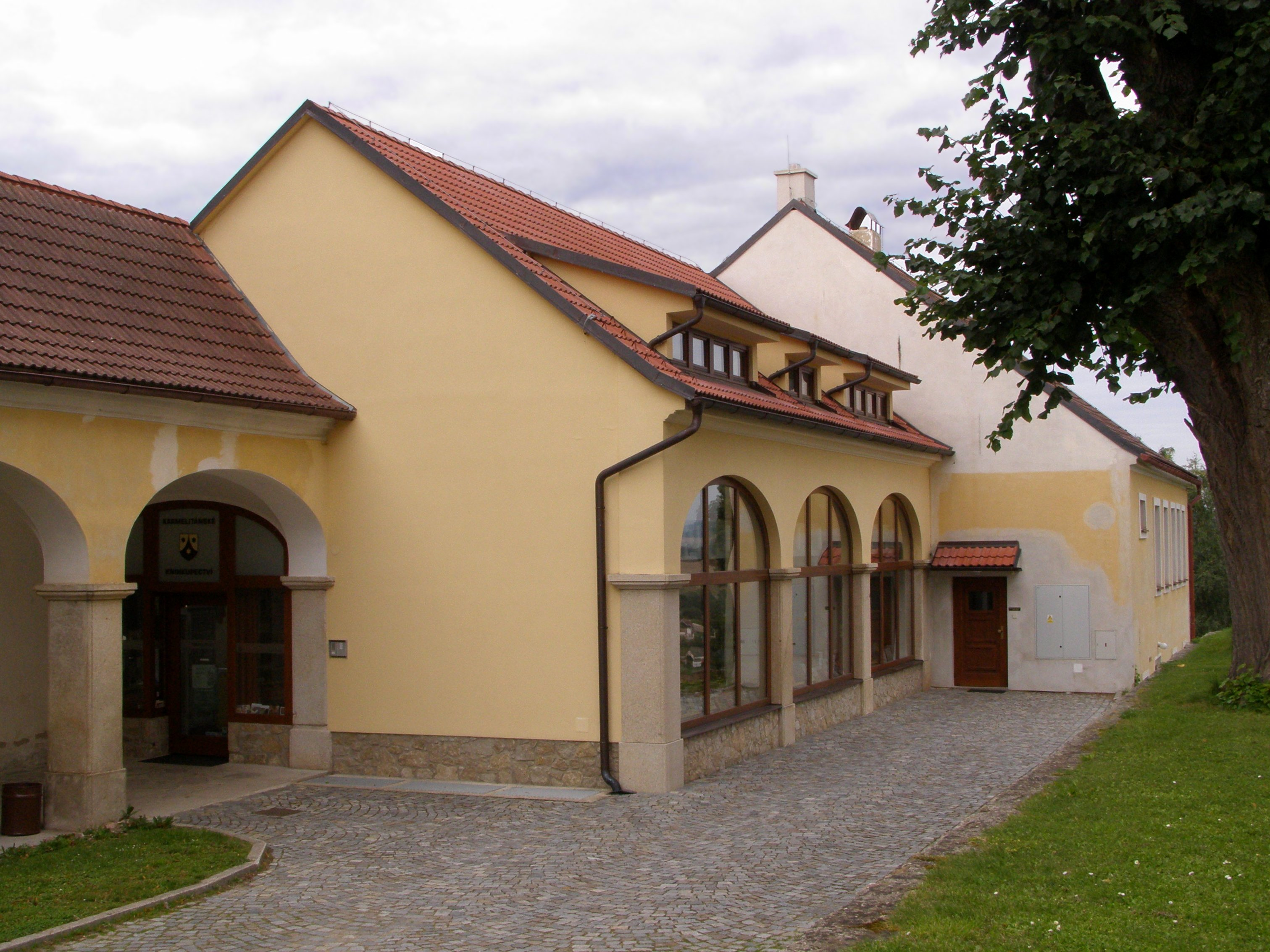 Česky: Kostelní Vydří, klášter karmelitánů, knihkupectví Karmelitánského nakladatelství